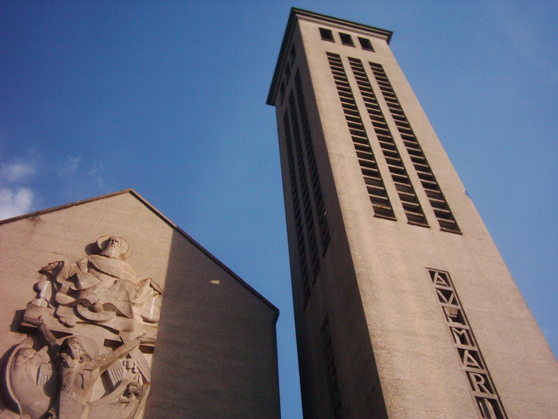 Basilique Notre-Dame de la Trinité, Blois. Le côté sud